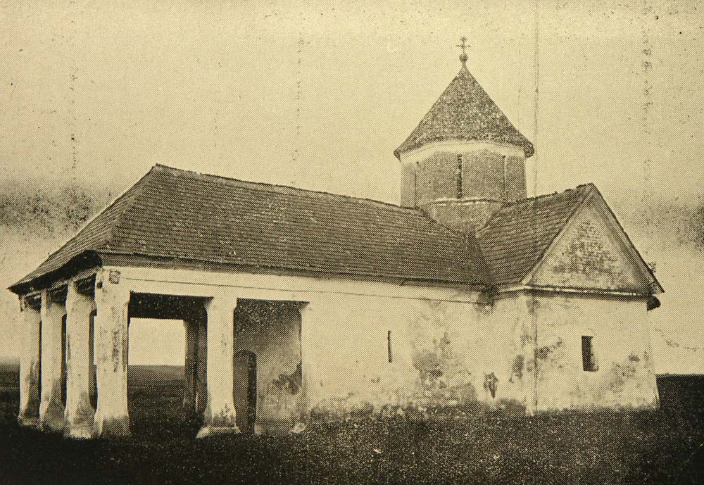 Mănăstirea Săraca